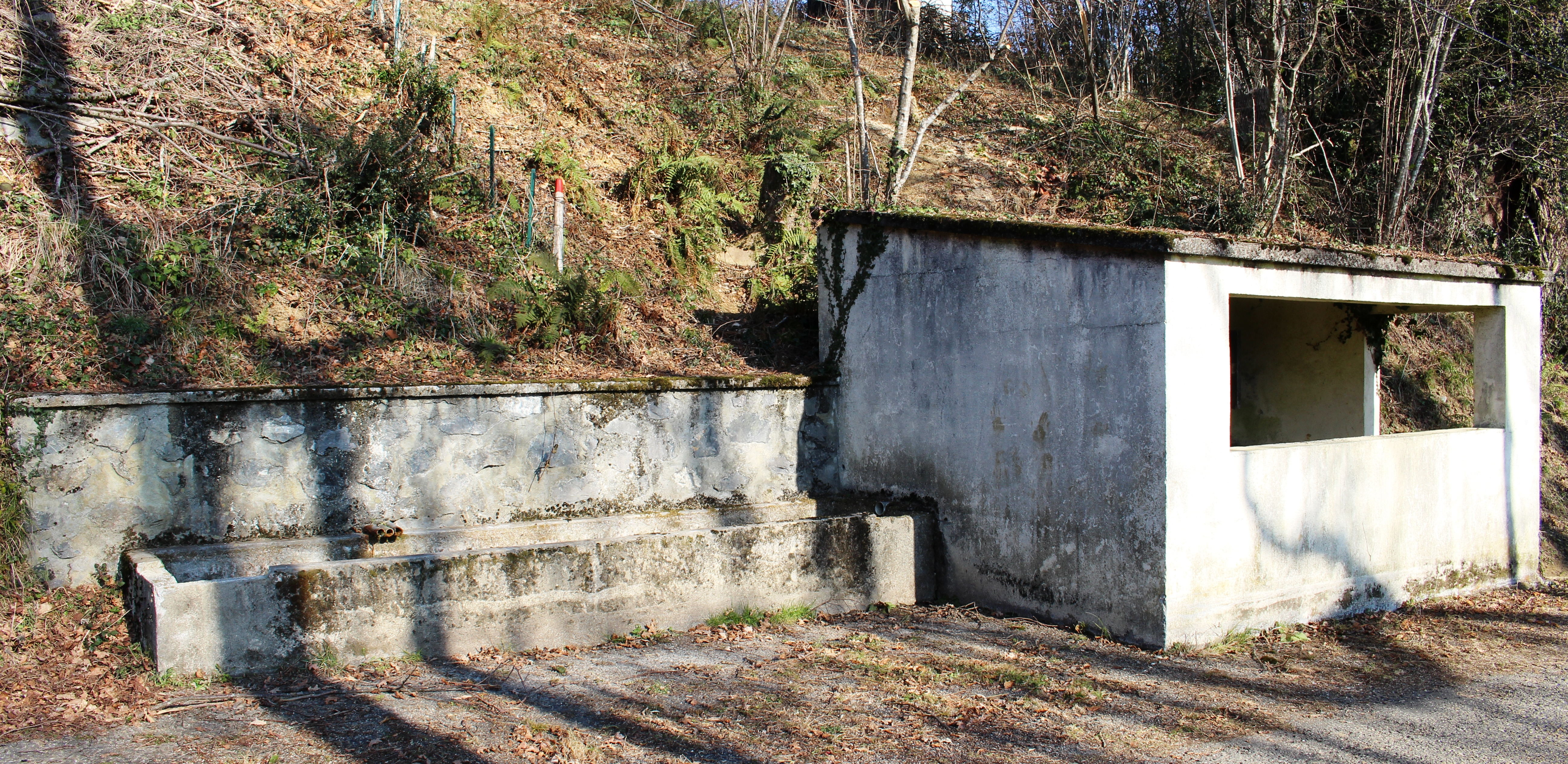 Lavoir de Castéra-Lanusse (Hautes-Pyrénées)